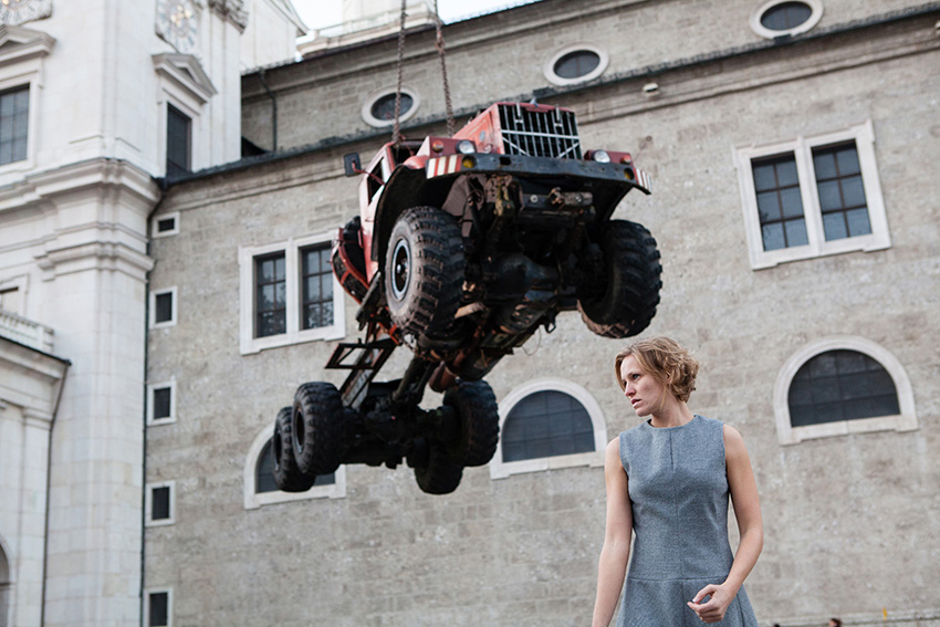 DRACHEN, 2013 Foto: Lawine Torrèn / Magdalena Lepka